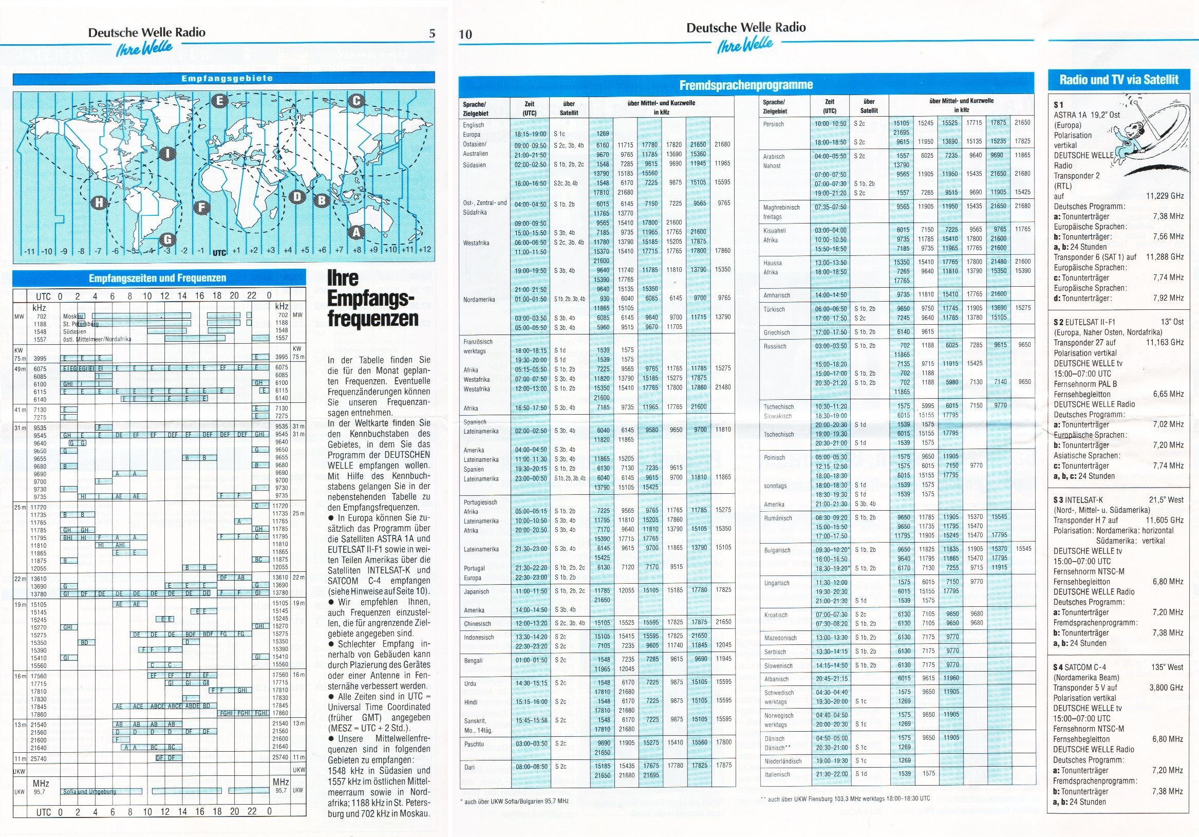 Deutsche Welle - Frequenzen und Sprachen (August 1993)